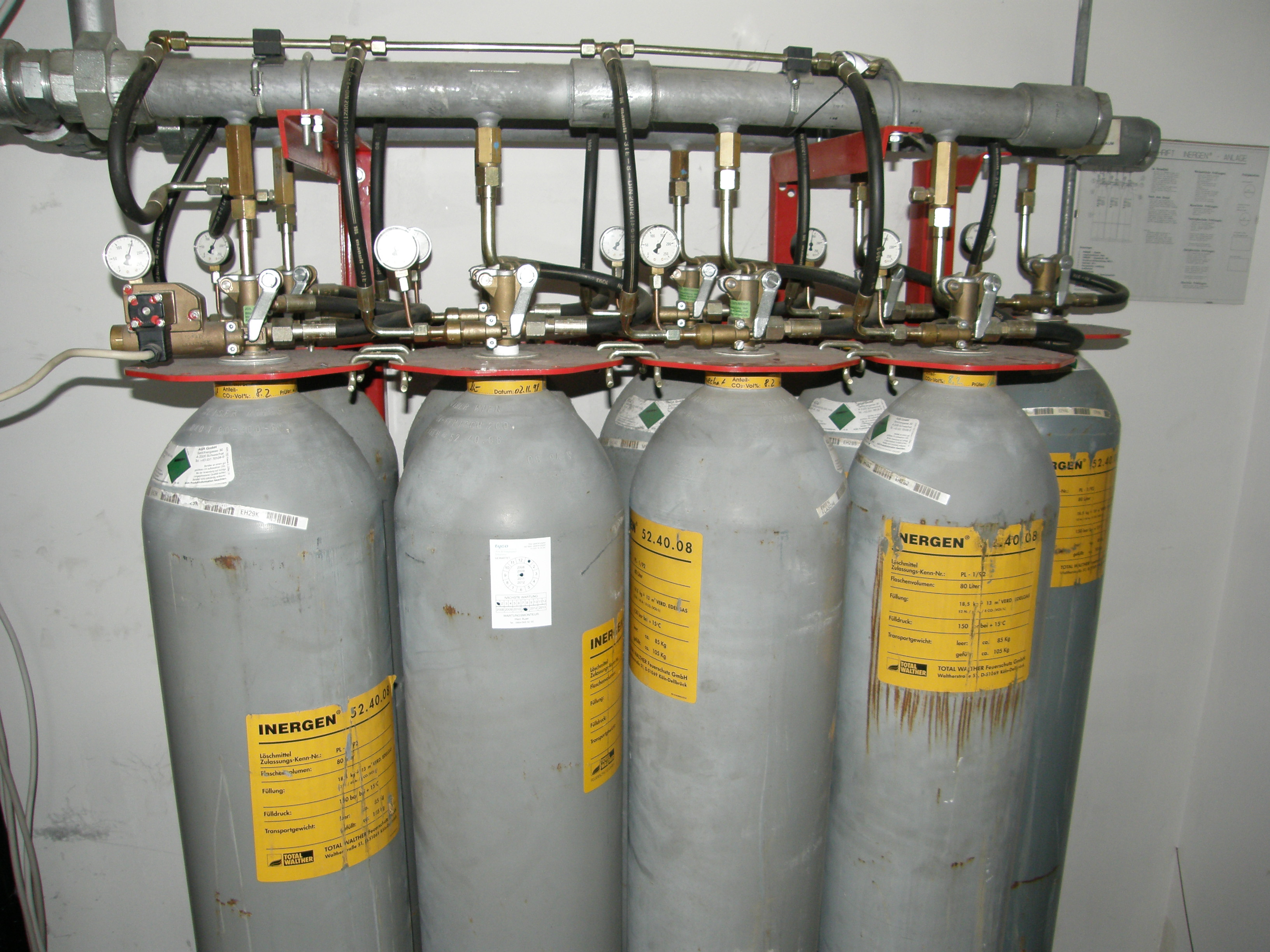 Inergen-Löschanlage